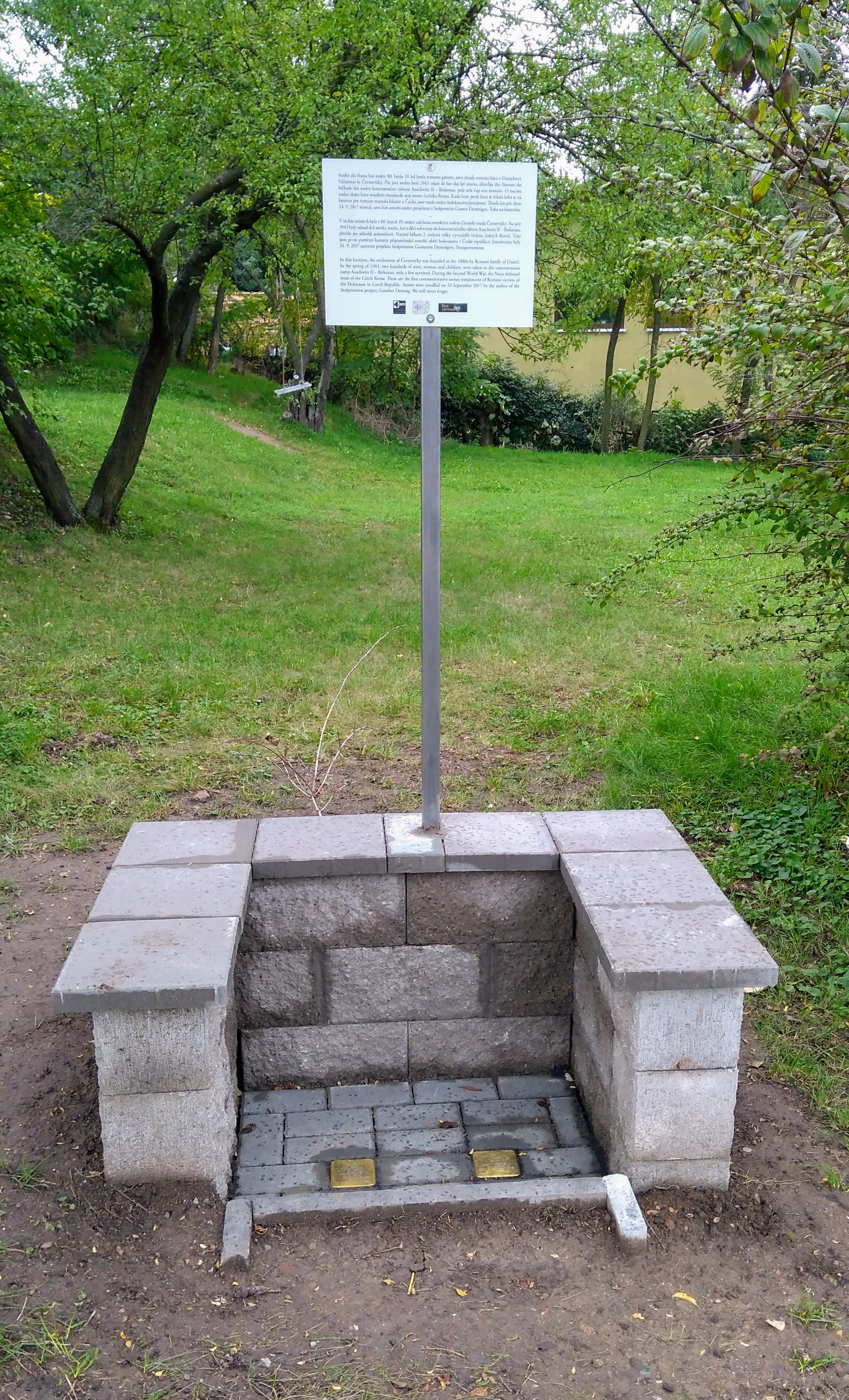 Stolpersteine Brno Černovičky Jan Daniel Amalie Danielová